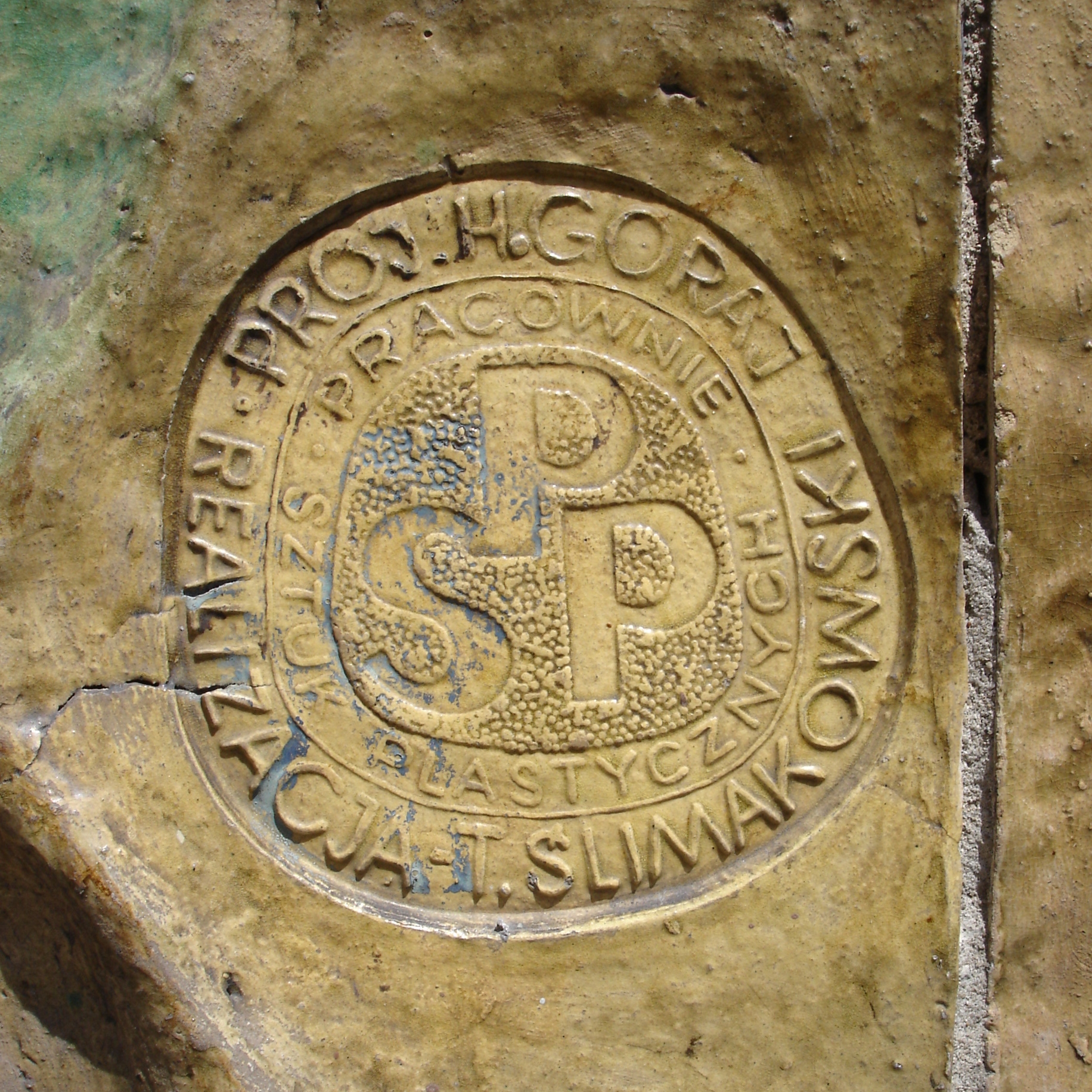 suchy stempel na ceramicznej okładzinie przy ul. Henryka Sienkiewicza 2 w Chorzowie, w prawym dolnym rogu. Zewnętrzny okręg: PROJ.H.GORAJ REALIZACJA-T.ŚLIMAKOWSKI Wewnętrzny okręg: ·PRACOWNIE · SZTUK PLASTYCZNYCH Pośrodku znak: PSP